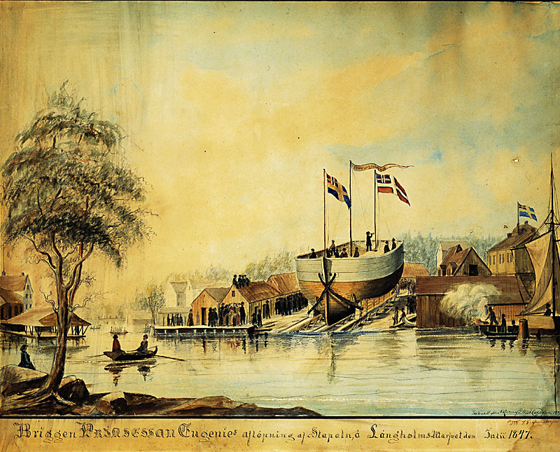 Tecknadt efter Naturen af P. Wilh. Cedergren 1847. Byggd af Gustaf Gummesson